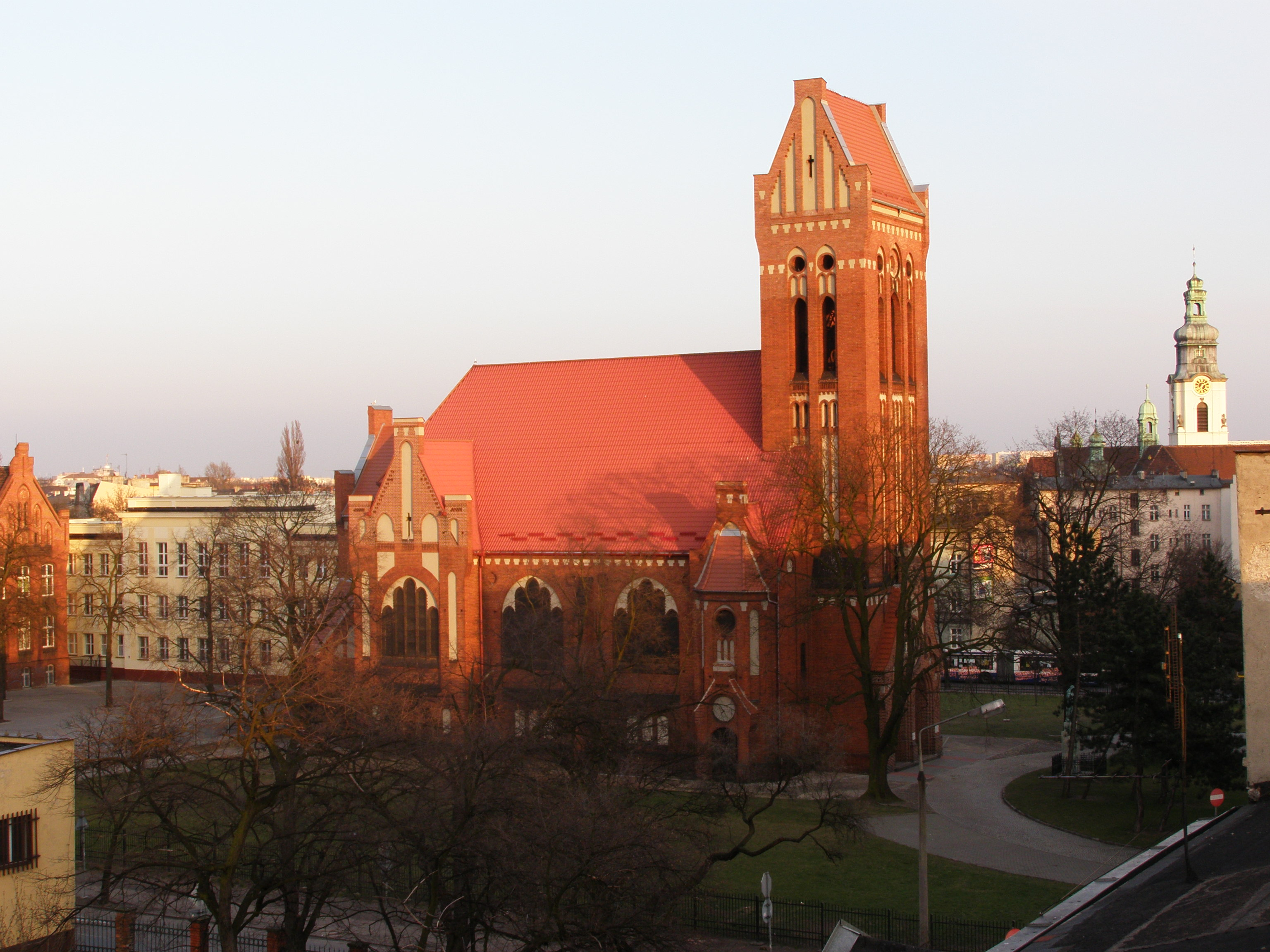 Bydgoszcz - Kościół ewangelicko-augsburski przy Pl.Zbawiciela